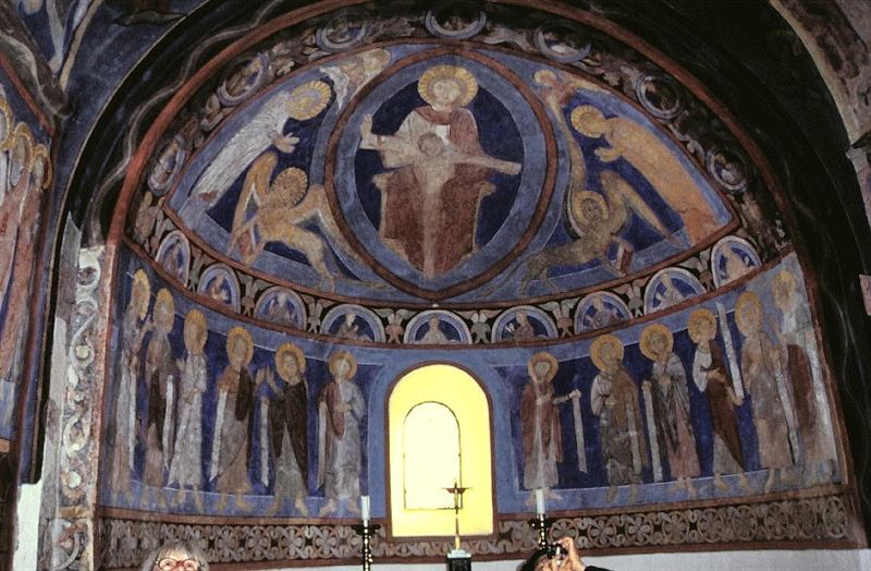 Bjäresjö kyrka i Skåne, Sverige. Apsis